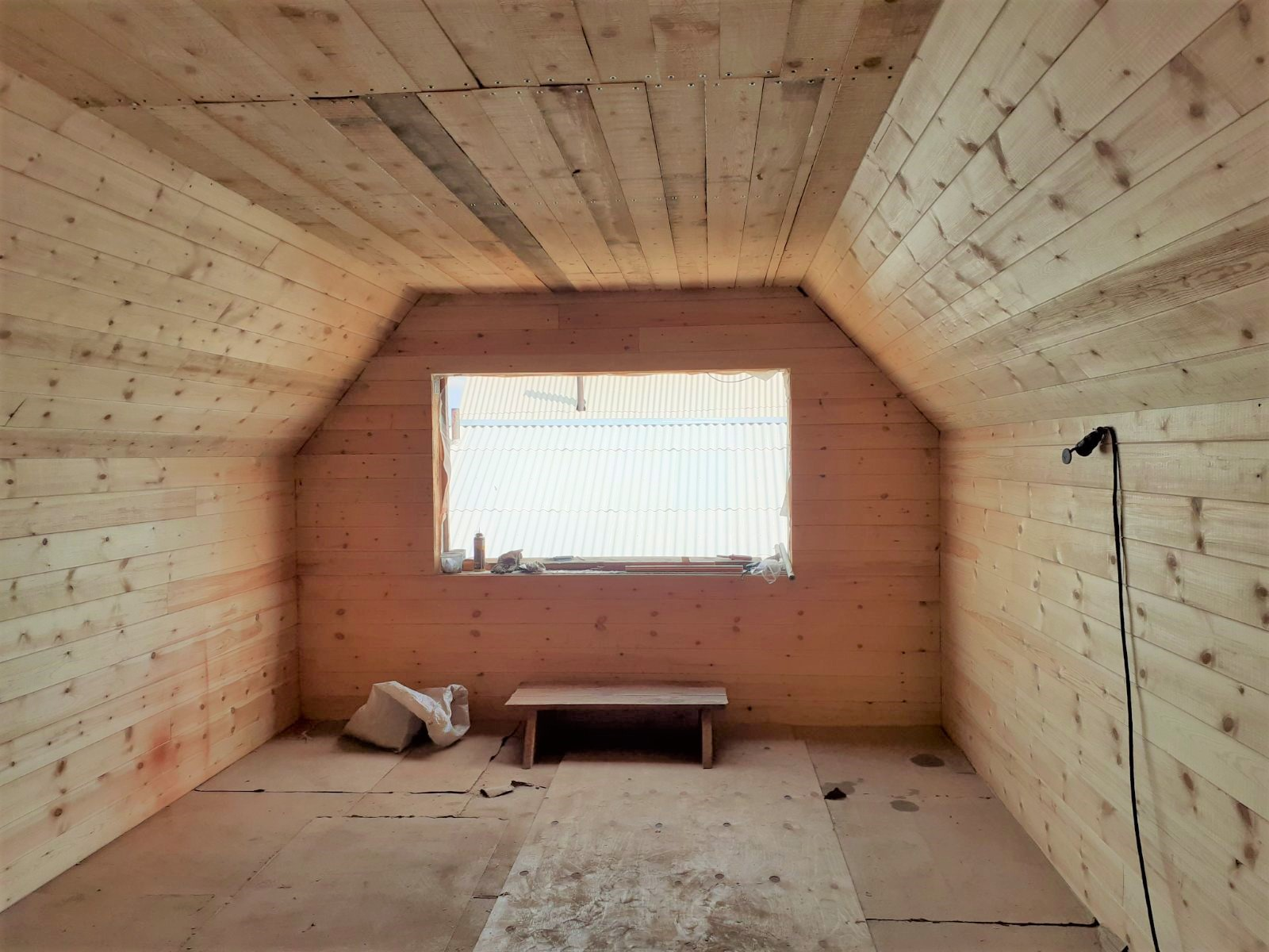 Attic under construction. Eastern Siberia